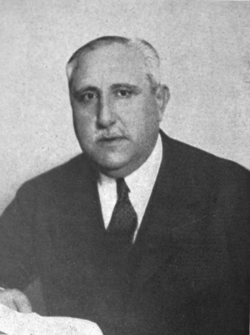 Gabriel Maura Gamazo